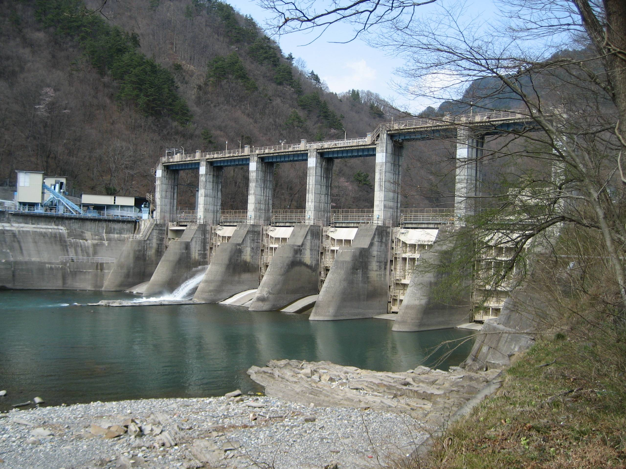 Ikusaka Dam (生坂ダム) is a dam in Ikusaka village, Nagano prefecture, Japan.